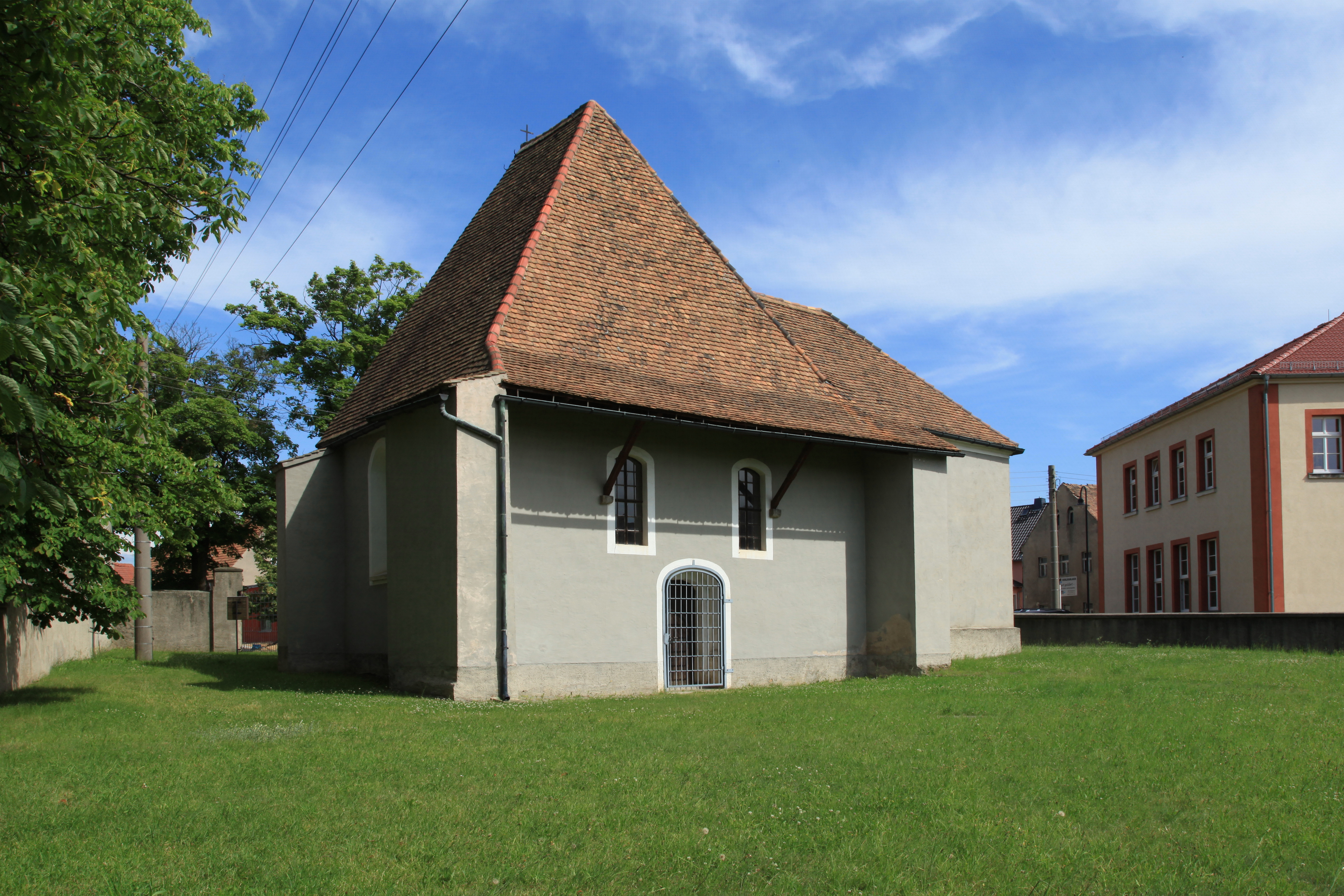 Alte Pfarrkirche, Dorfplatz in Radibor Hornjoserbsce: Stara wosadna cyrkej w Radworju.